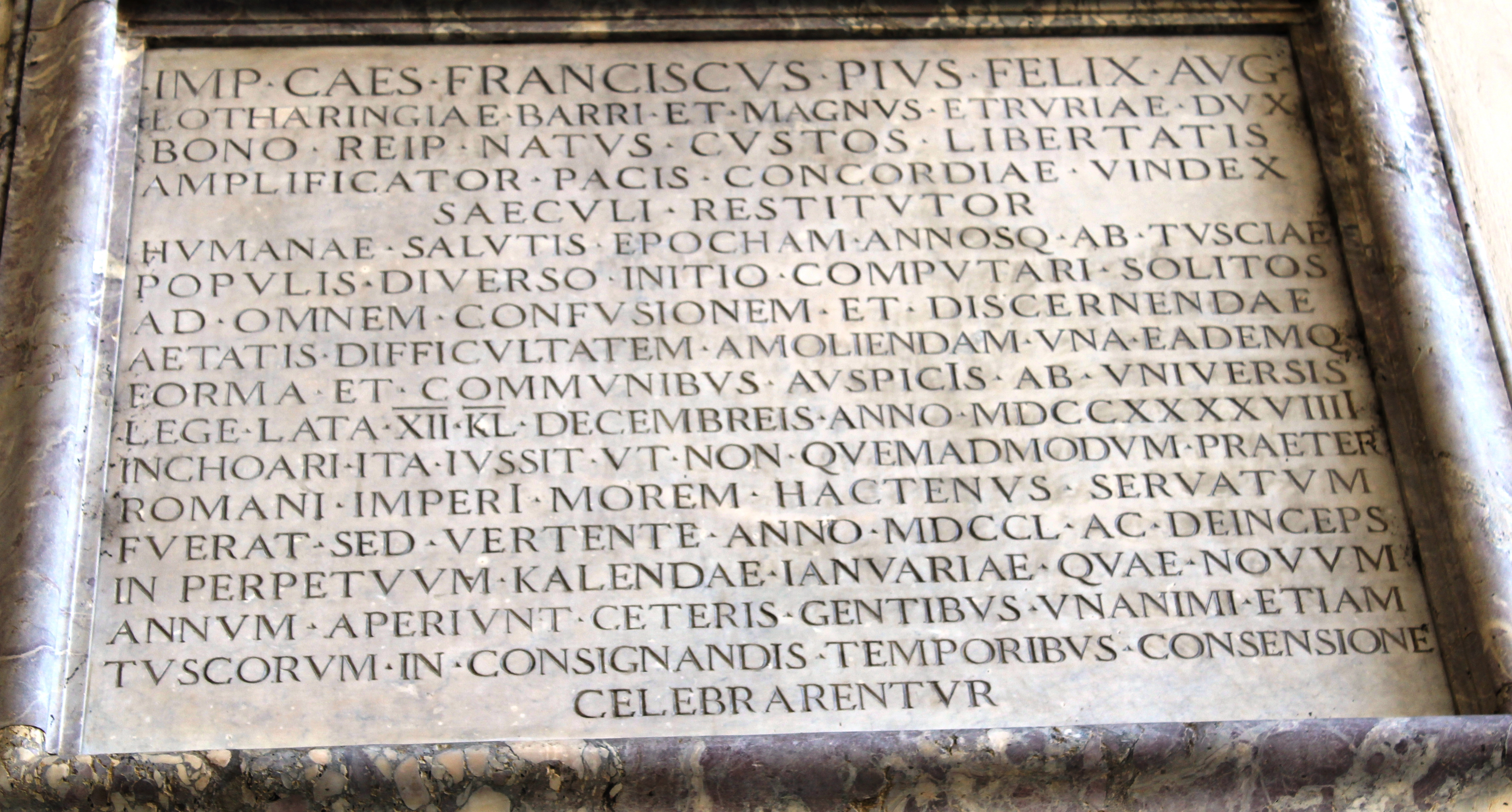 Imagem da placa comemorativa da mudança de Ano Novo na cidade de Florença, de 25 de março para 1 de janeiro, a partir do ano de 1750, determinada pelo novo Duque da Toscânia, Francisco I, Imperador do Sacro Império Romano-Germânico, colocada na Loggia dei Lanzi, na Piazza della Signoria, em Florença.